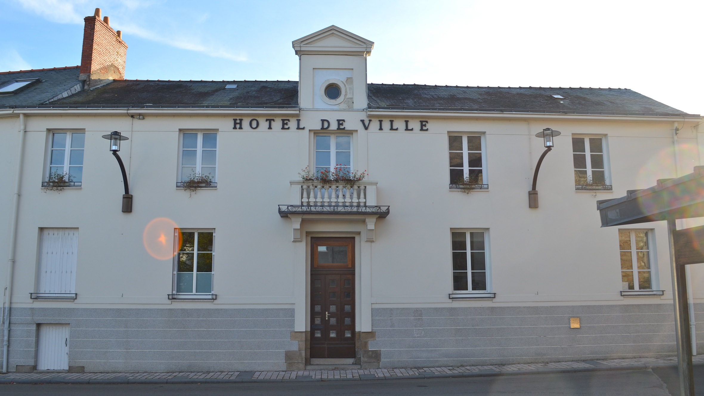 Mairie - Saint-Jean-de-Boiseau (Loire-Atlantique)